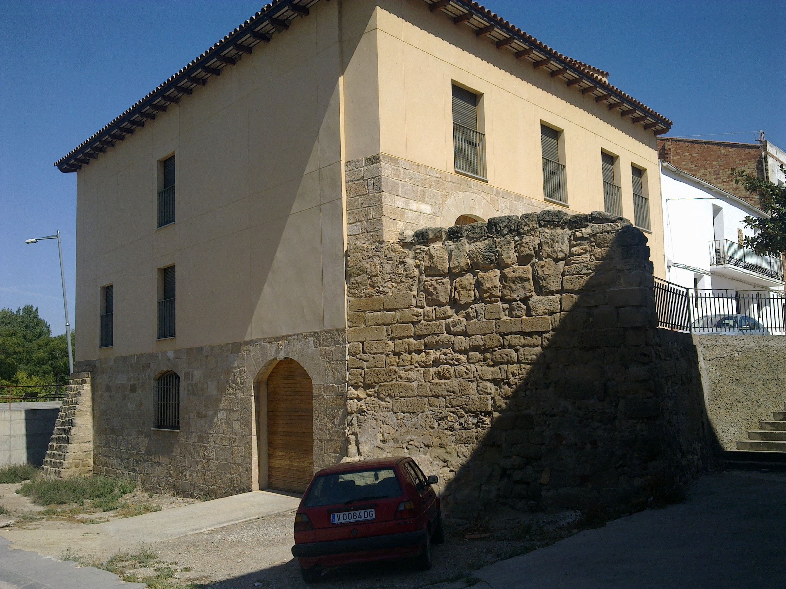 Obra popular Medieval, XVIII